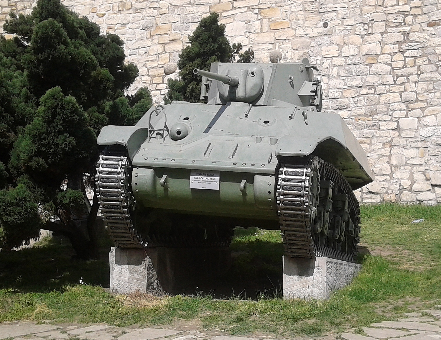 Panzer (M3-A3 Stuart) in der frei zugänglichen äußeren Ausstellung des Militärmuseums Belgrad (Serbien)